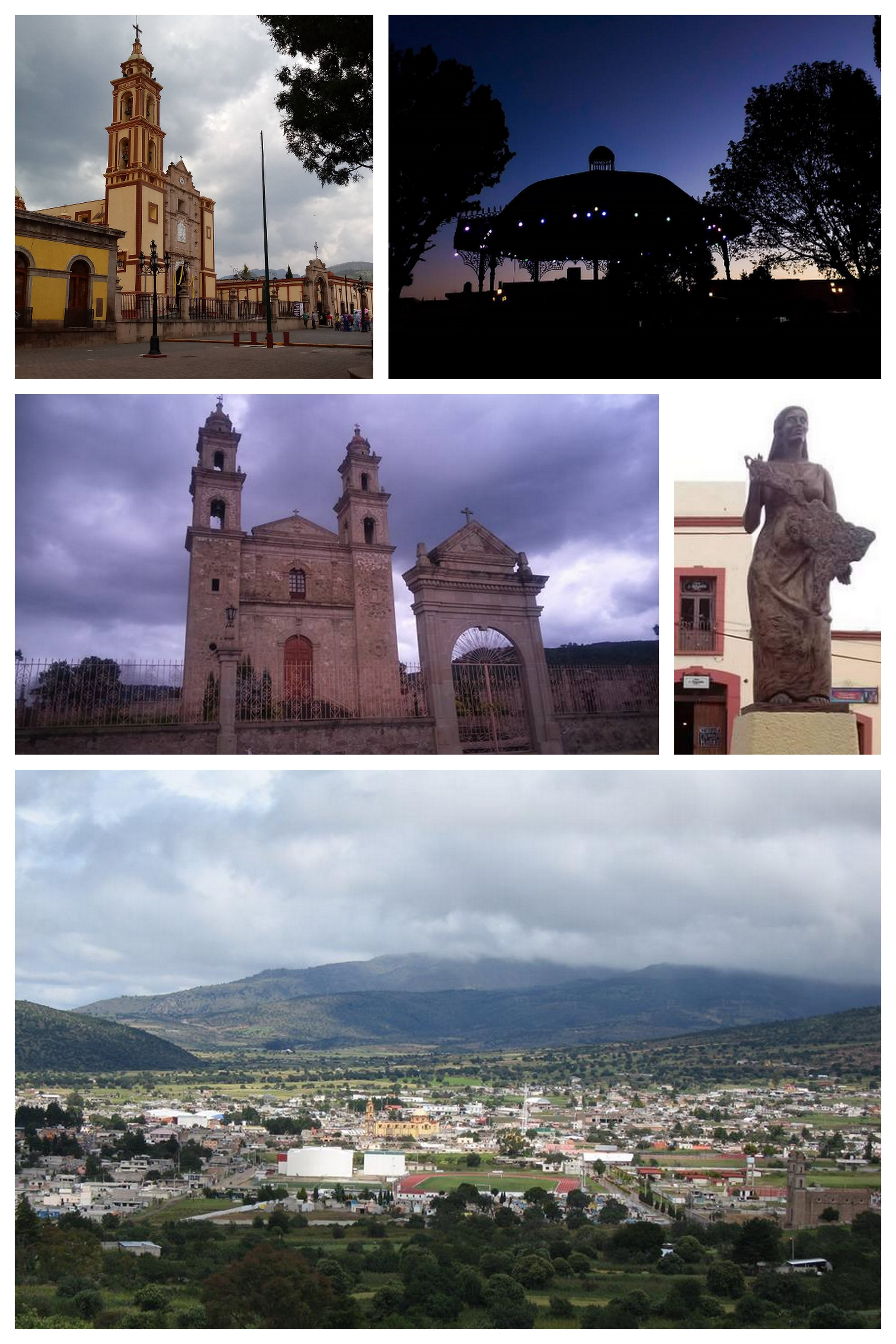 Montaje creado a partir de cinco imágenes en Wikimedia Commons: File:Capilla de Nuestra Señora de Lourdes.jpg File:Panoramica de Tlaxco.jpg File:Kiosko de Tlaxco.jpg File:Parroquia de Tlaxco.jpg File:Monumento a la Patria.png